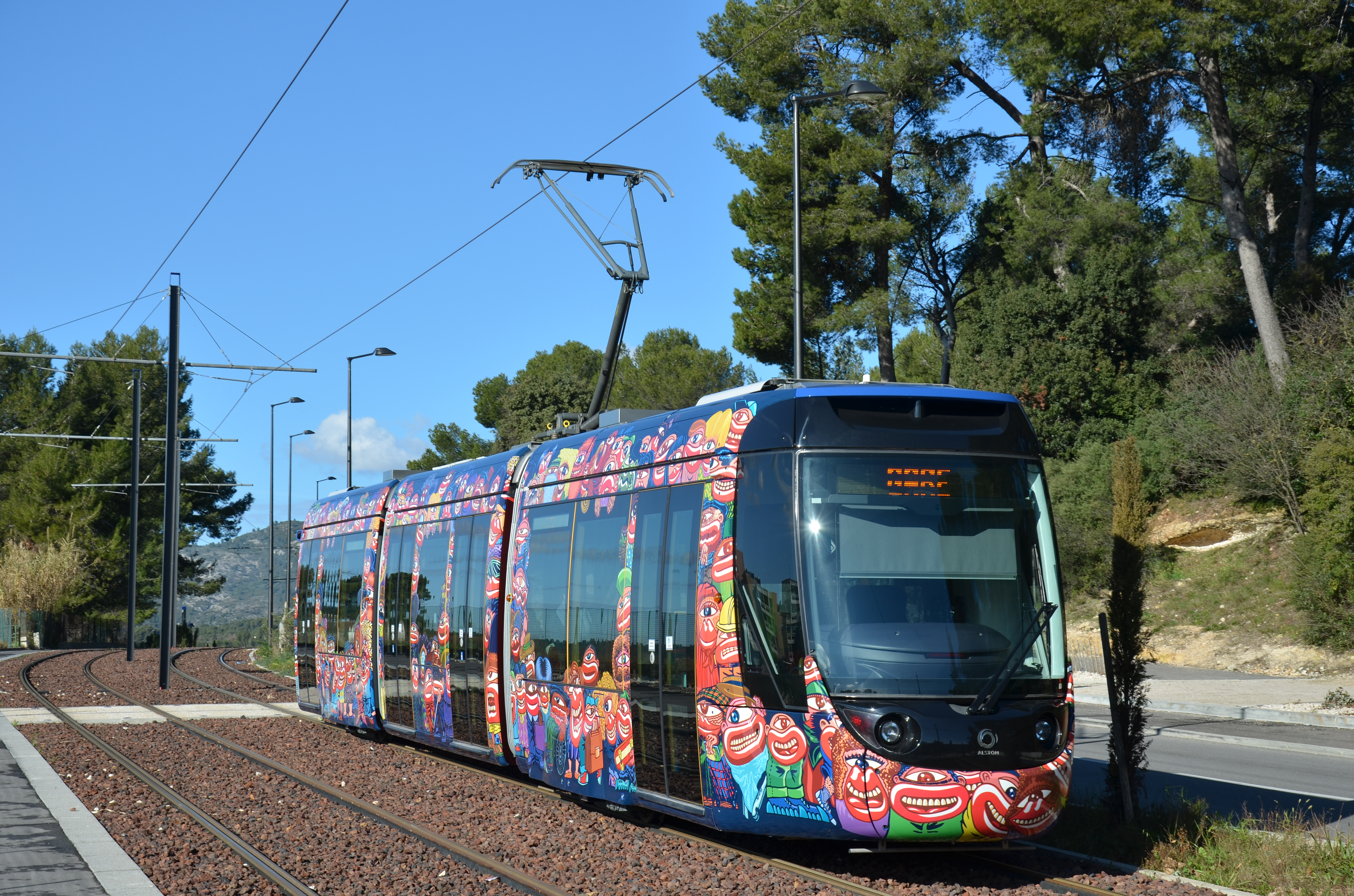 Alstom Citadis Compact entre les interstations de Château Blanc et Piscine Alain Bernard / Oasis du Charrel, sur le réseau LIGNES DE L'AGGLO à Aubagne.